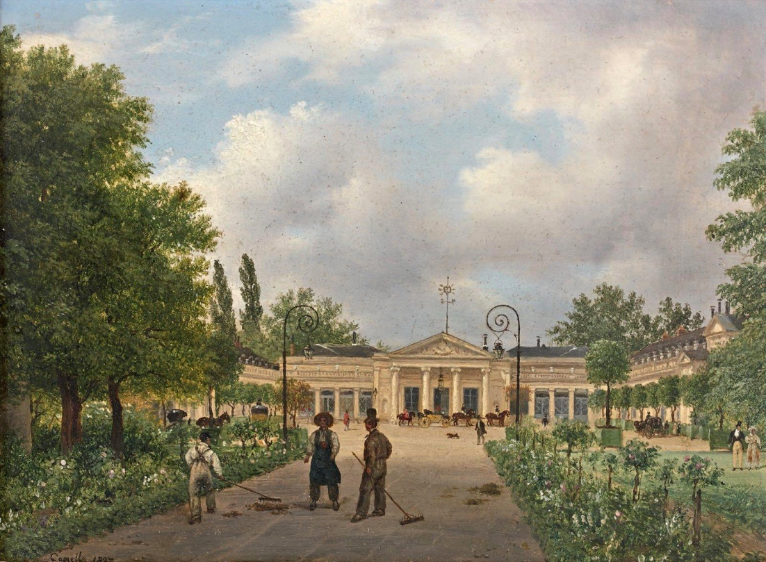 Le tableau huile de 13,4 cm par 18,5 cm, signée Guiseppe Canella (1788-1847) en bas à gauche et datée 1827. Collections personnelles de la reine Marie-Amélie. Château de Neuilly-sur-Seine, demeure de Louis-Philippe, duc d’Orléans sous le règne du roi de France Charles X.